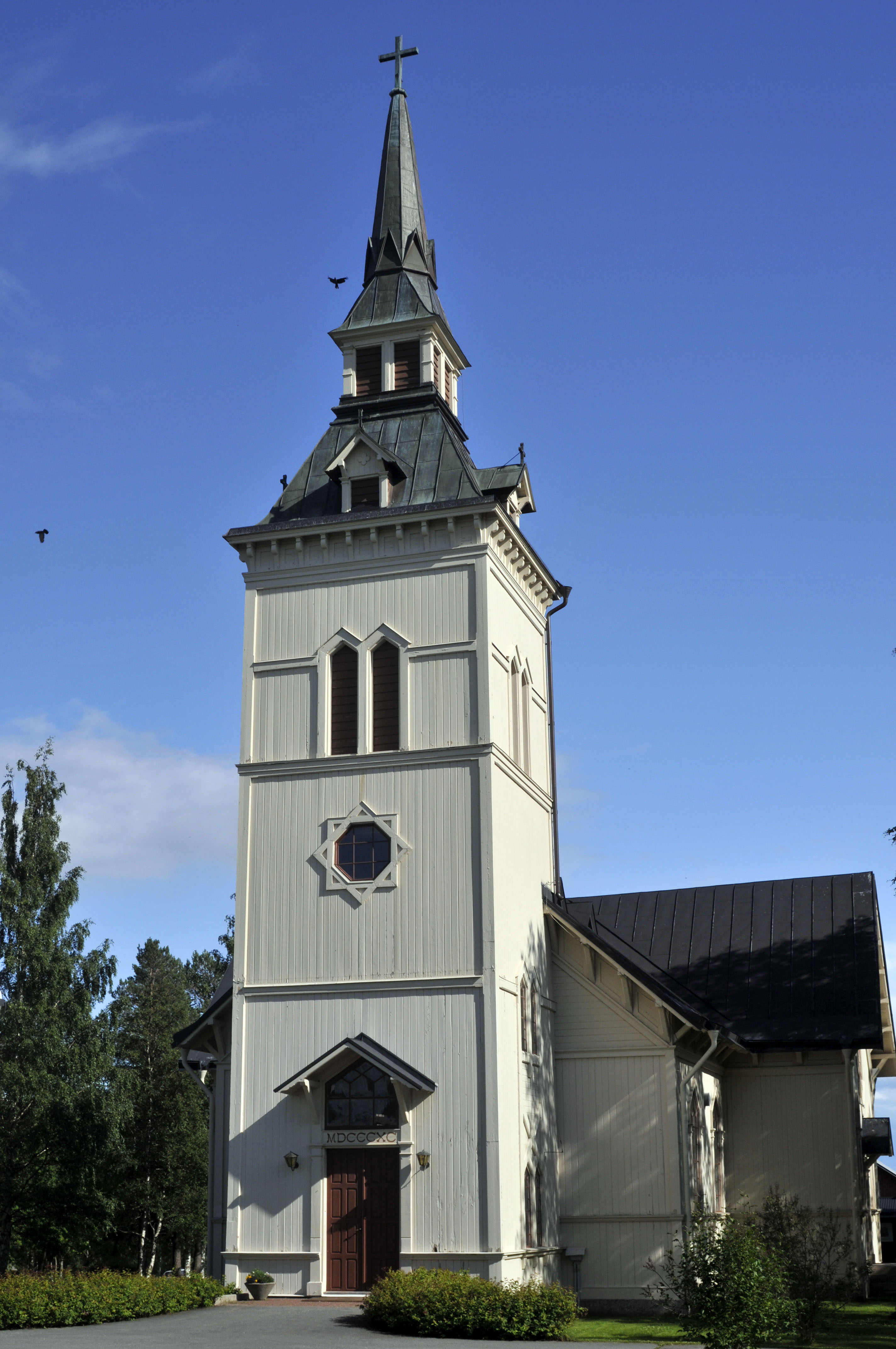 Marieby nya kyrka